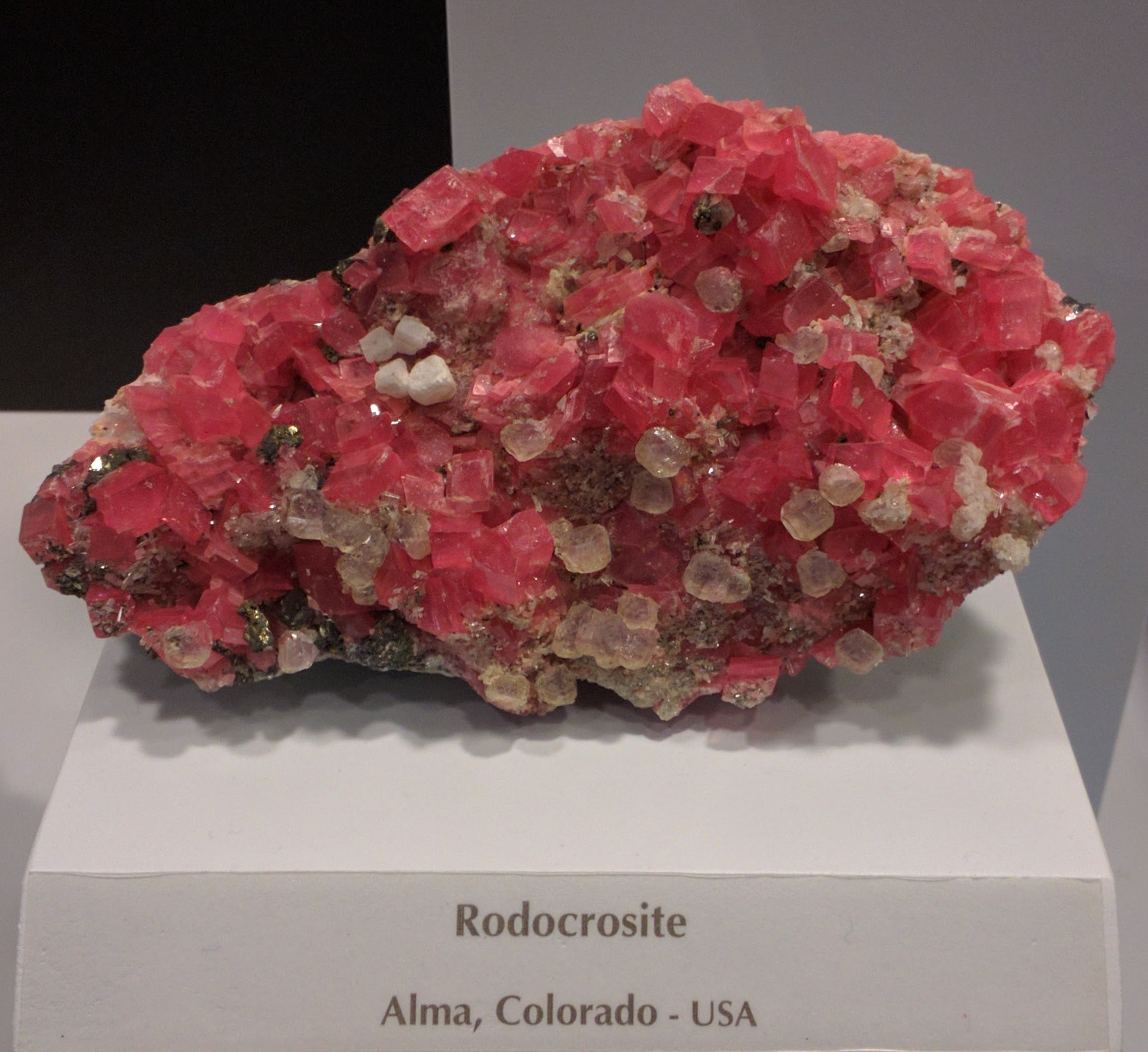 rodocrosite